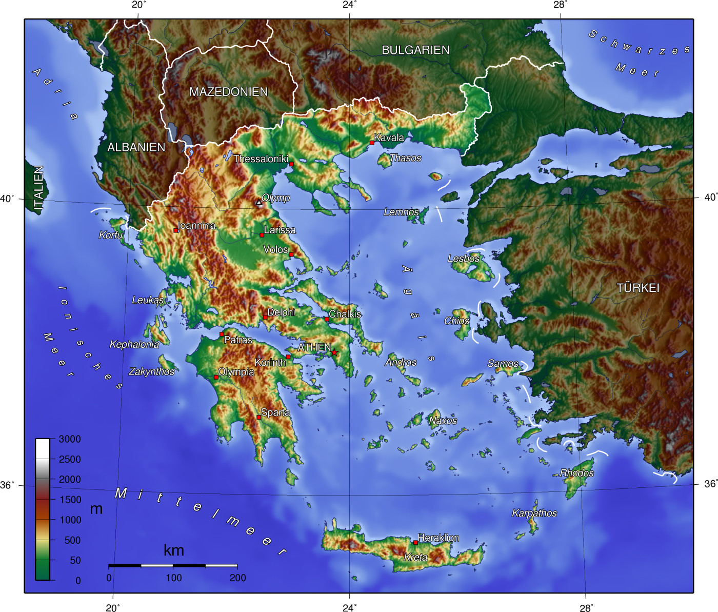 Topografische Karte von Griechenland